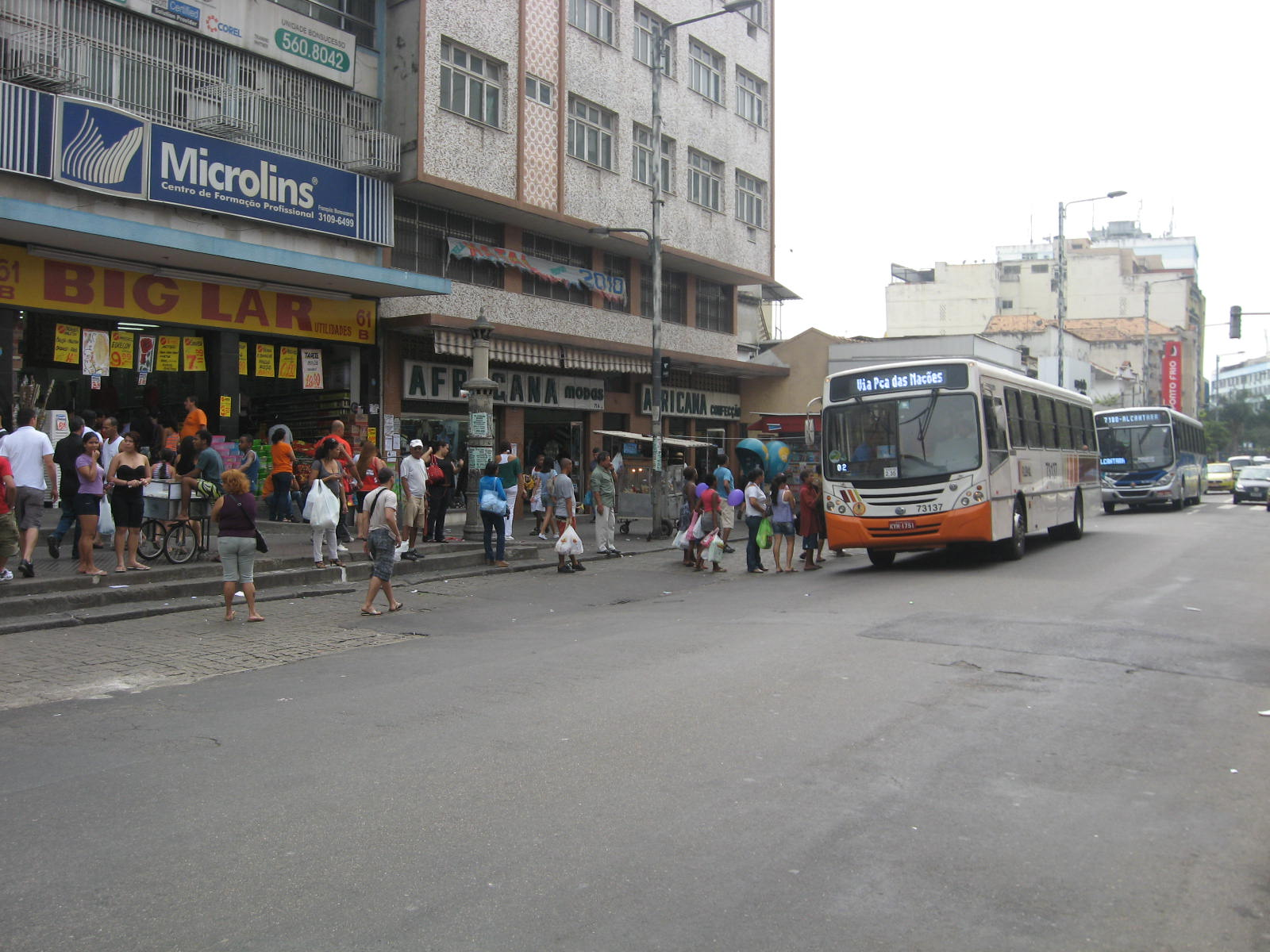 Vista do bairro suburbano de Bonsucesso na cidade do Rio de Janeiro.